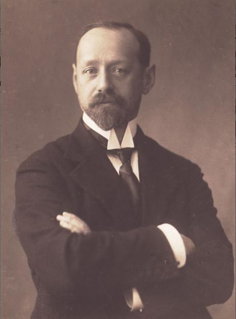 Портрет Эмиля Оскаровича Визель